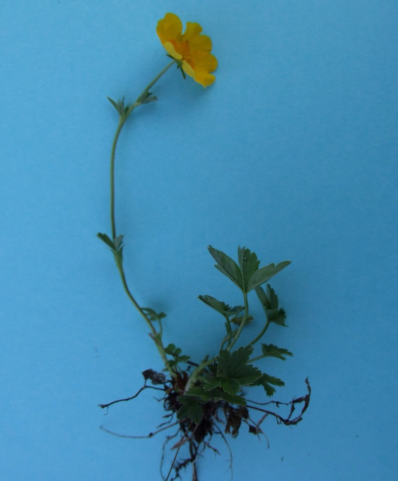 Potentilla crantzii